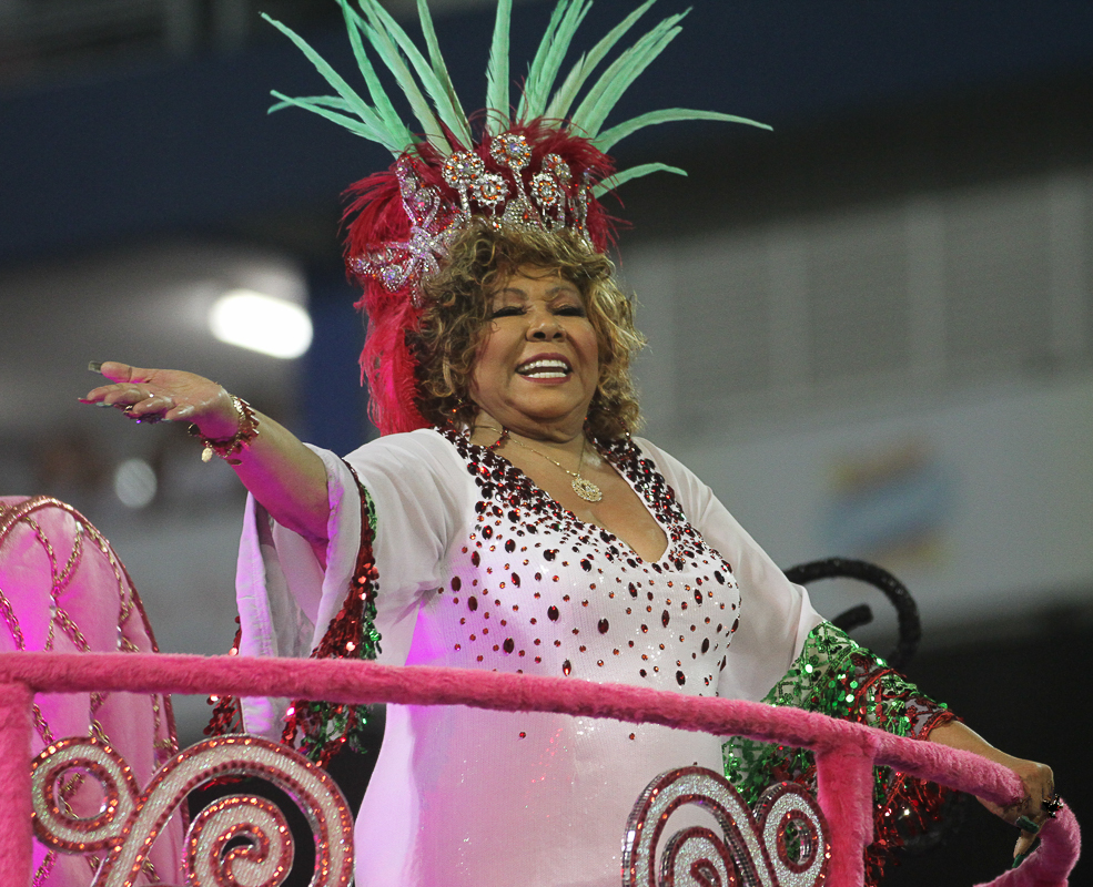 Desfile das Escolas de Samba de SP